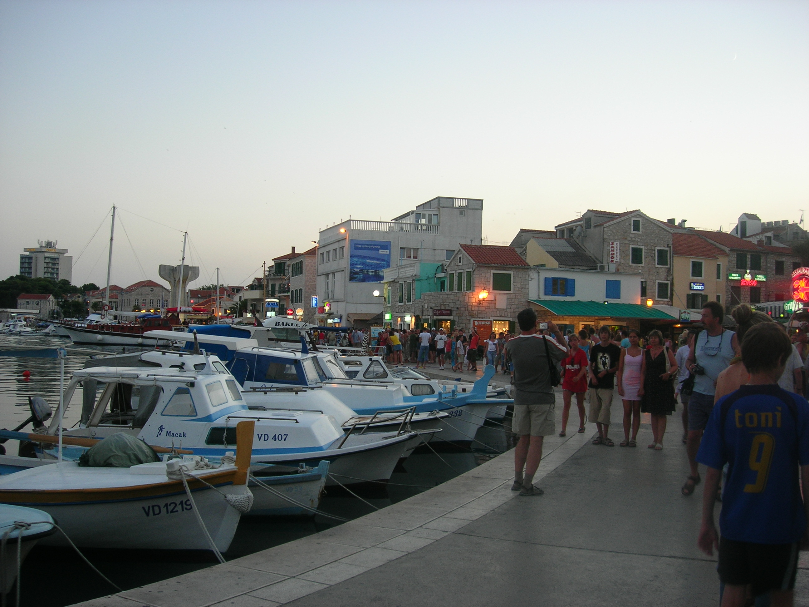 Monument in Vodice, Croatia